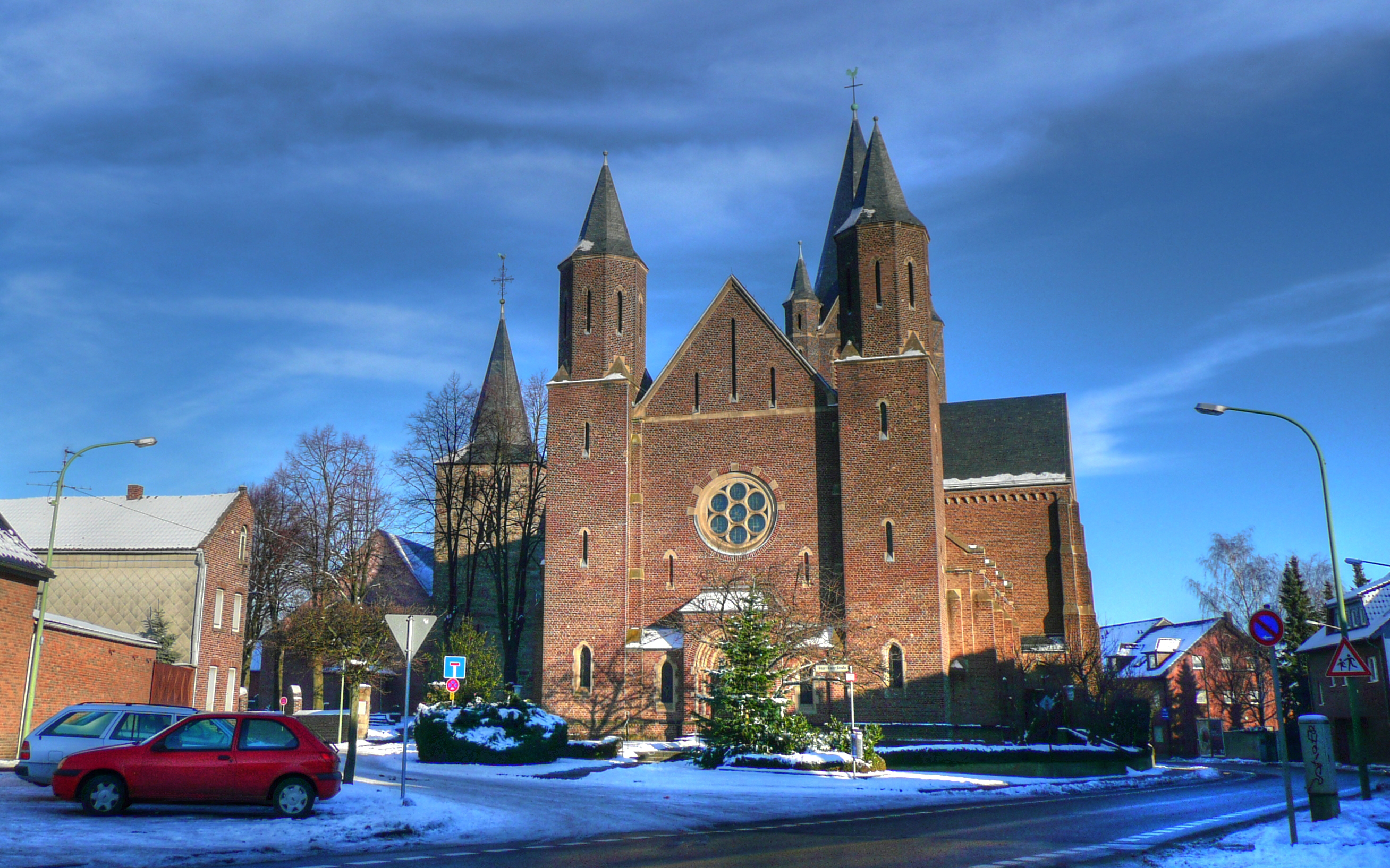 Die beiden Kirchen in Arnoldsweiler